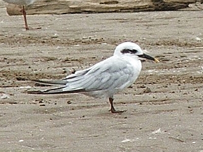 Sterna trudeaui, Gaviotín de Antifaz o Lagunero en San Clemente del Tuyú, Argentina